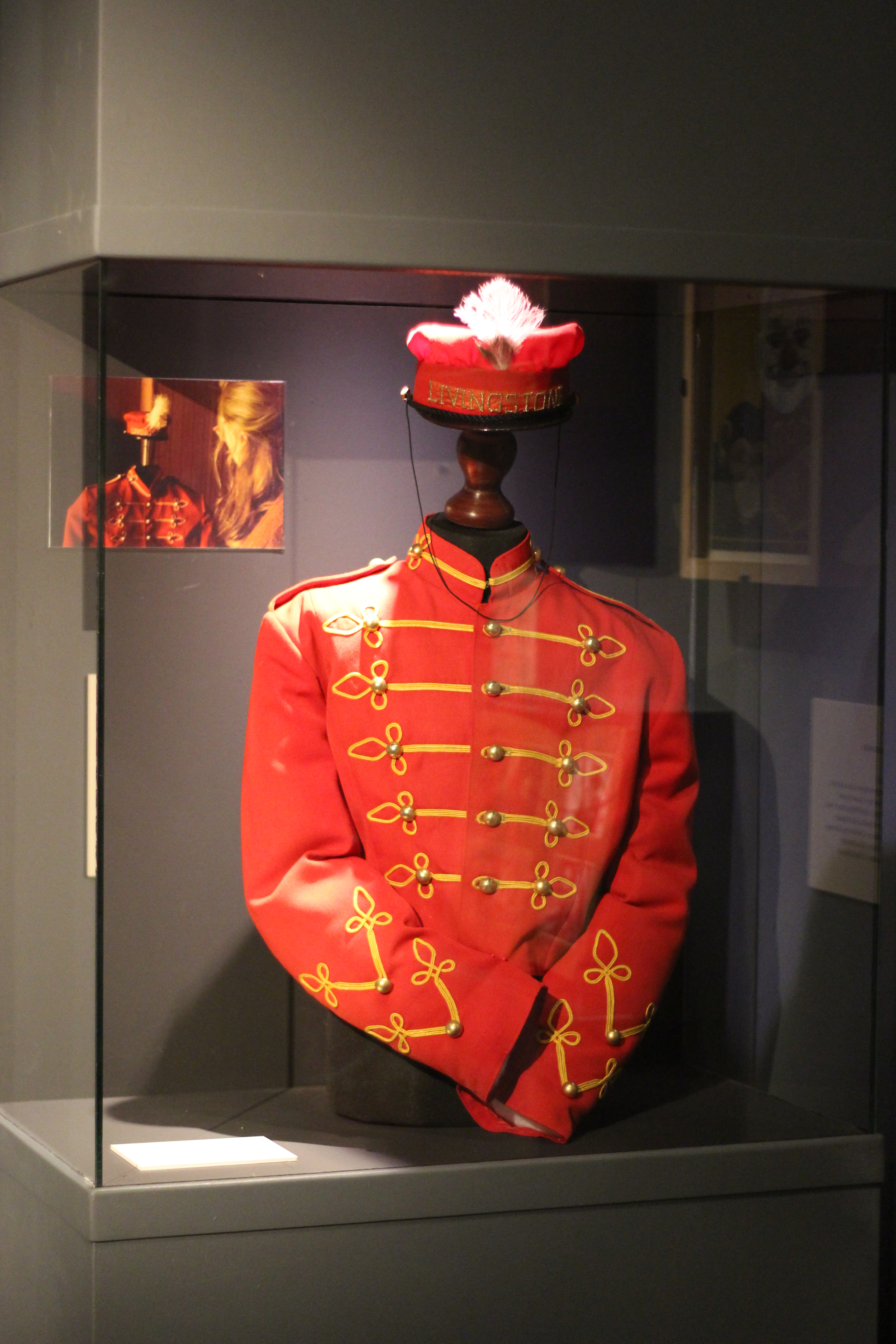 Uniforme du Docteur Livingstone, le singe savant du film Delicatessen. Exposition "Caro/Jeunet" au musée Minature et Cinéma en 2018-2019.